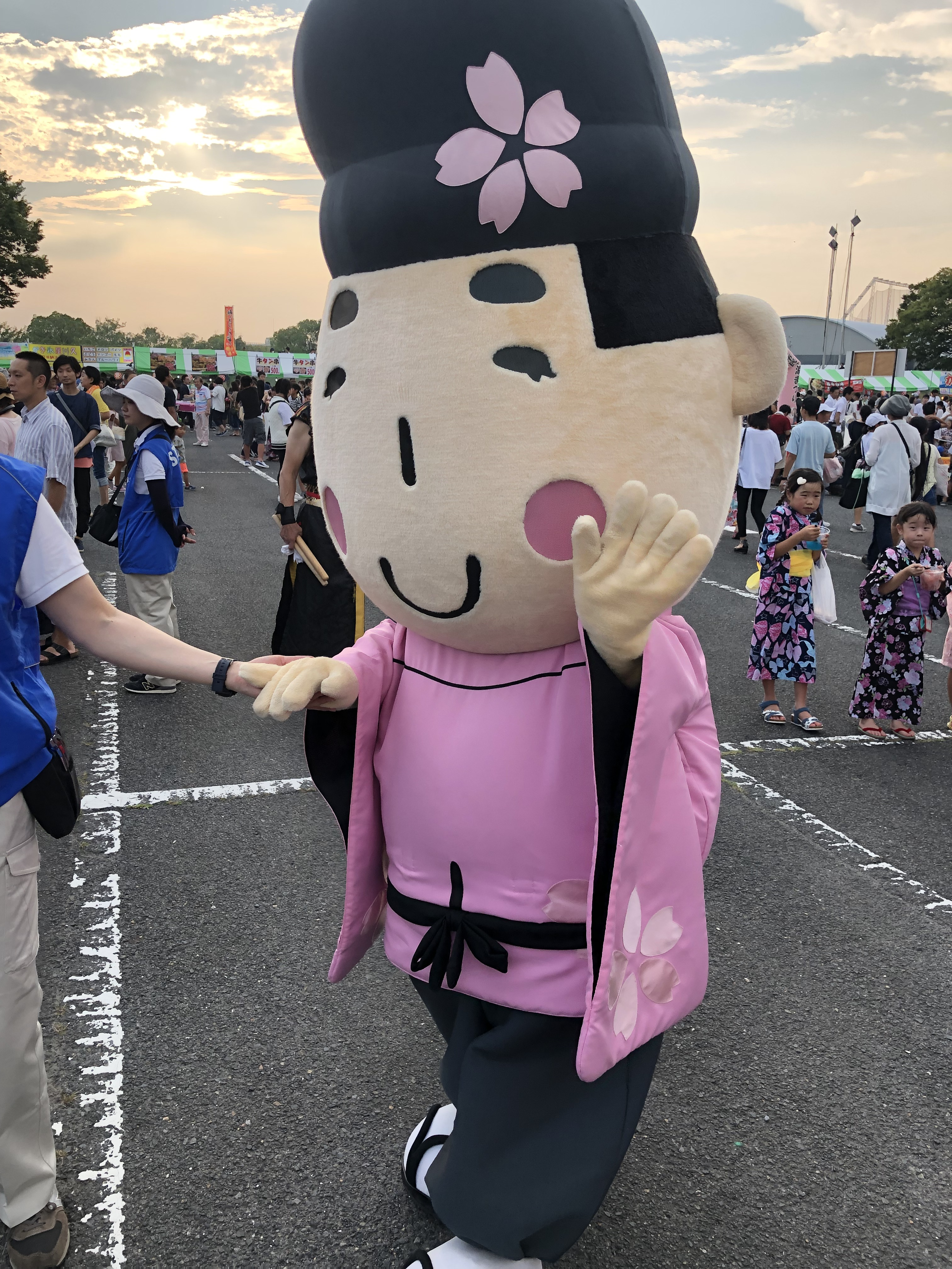 道風くん